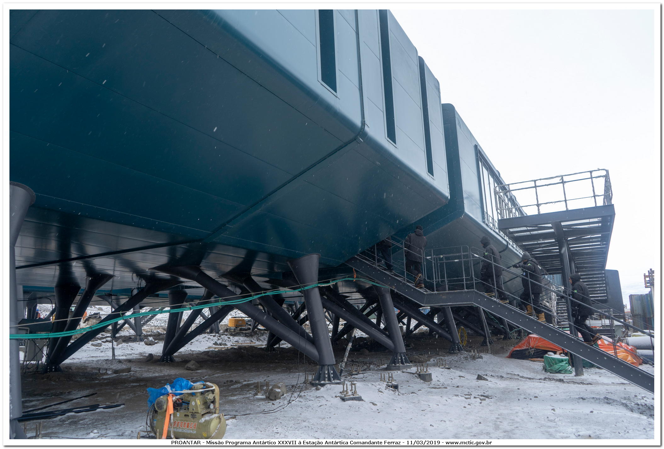 PROANTAR - Missão Programa Antártico XXXVII à estação Antartica Comandante Ferraz 11/03/2019 - Uma parceria entre Ministério da Ciência, Tecnologia, Inovações e Comunicações(MCTIC), Marinha do Brasil e Operadora Oi.